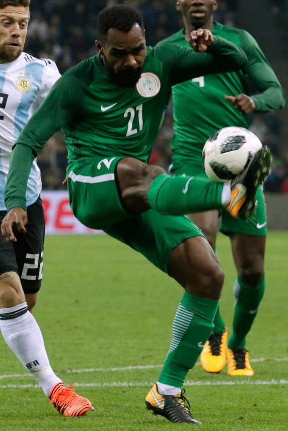 Brian Idowu, Alejandro Darío Gómez